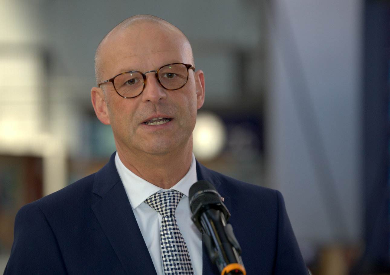 Martin Seiler, deutscher Manager, seit Januar 2018 Vorstand Personal und Recht der Deutschen Bahn AG. Hier am 9.12.2019 während einer Pressekonferenz der Deutschen Bahn im Münchner Hauptbahnhof. Titel des Werks: "Bahnvorstand (Personal und Recht) Martin Seiler (12/2019)"